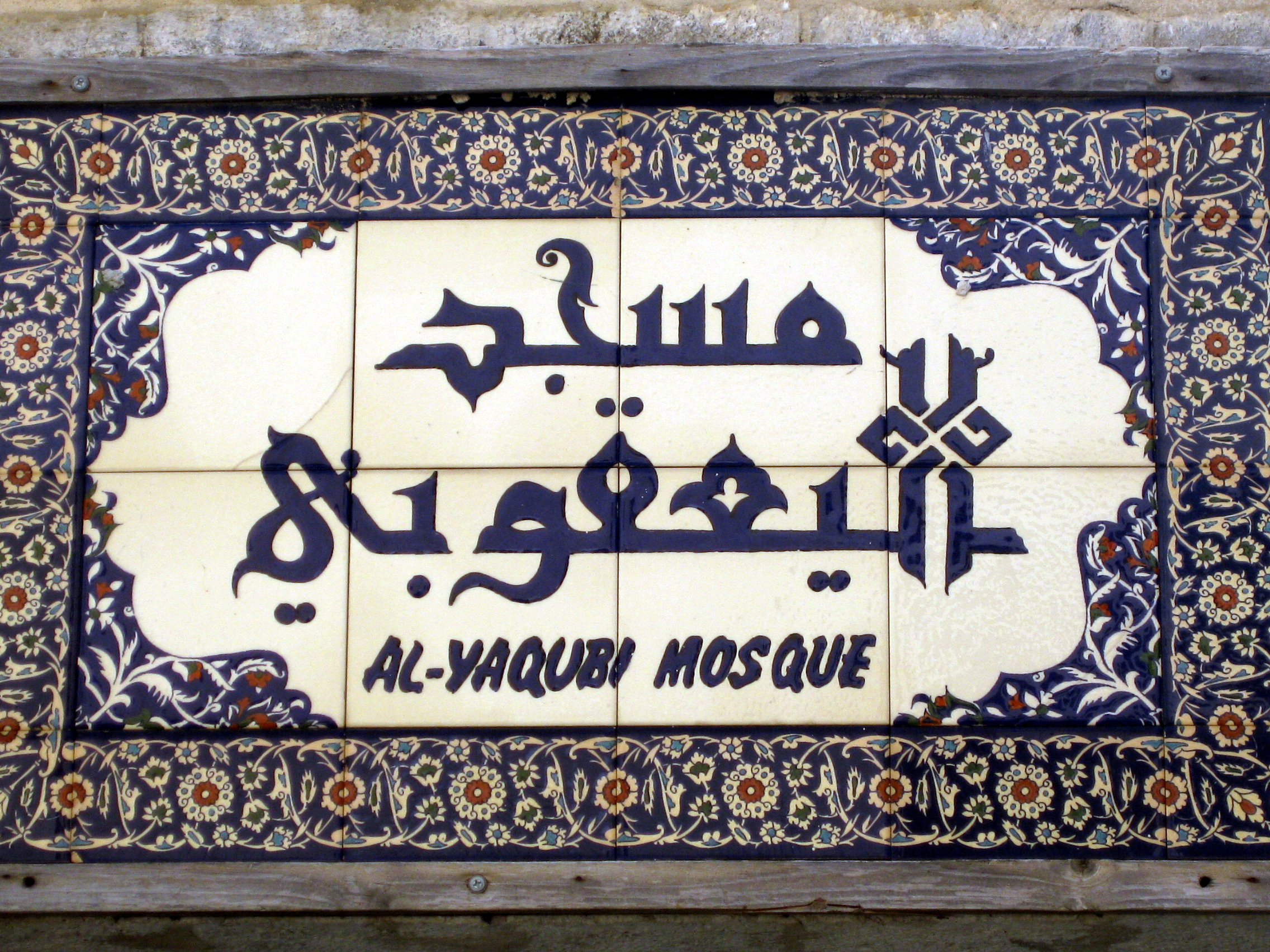 Yaakubi mosque in Jerusalem